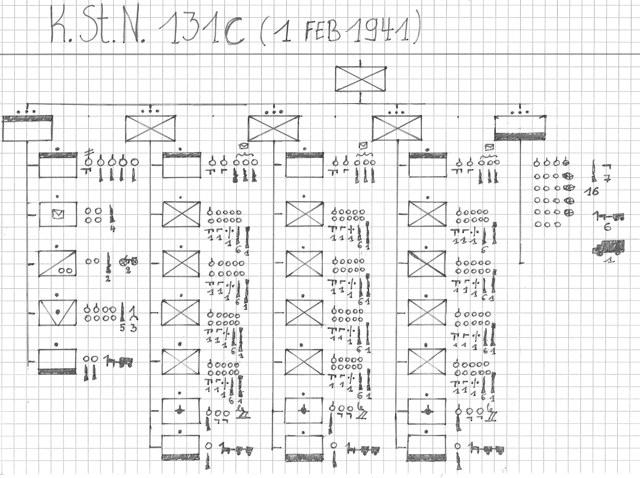 KSTN 1 fevr 1941 inf kp